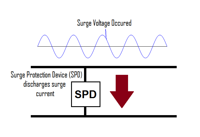 مکانیزم عمل سرج پروتکتور